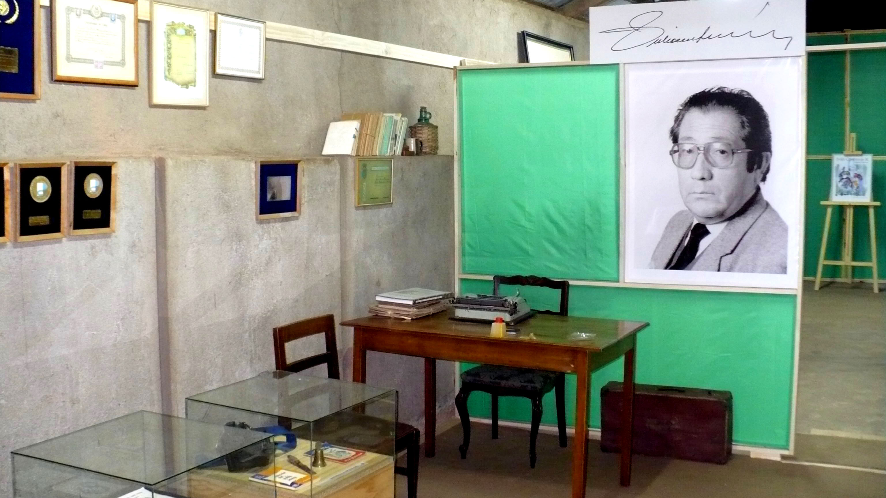 Museo Hisórico de Purén - Agrupación Cultural Purén Indomito